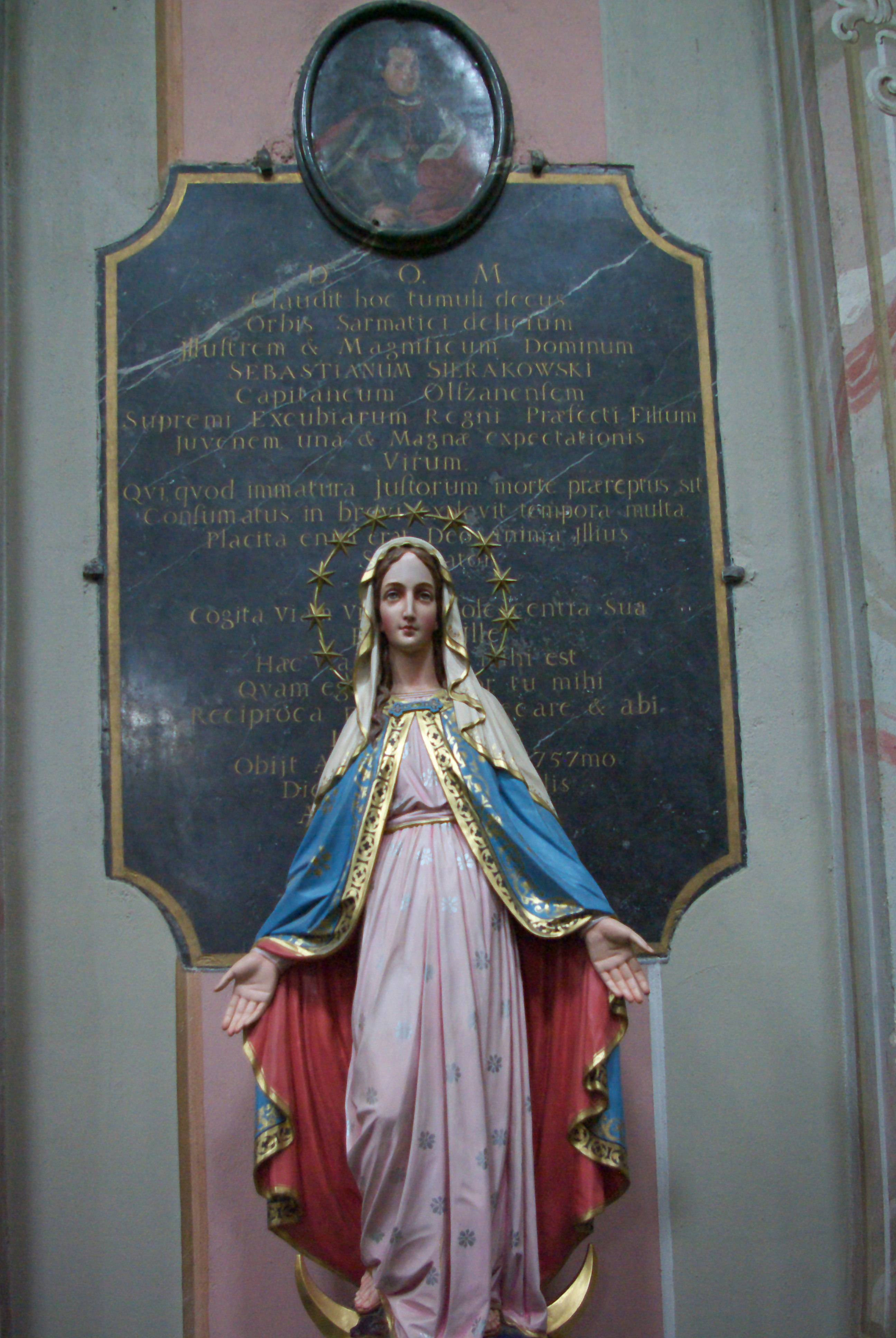 Epitafium Sebastiana Sierakowskiego w kościele Przemienienia Pańskiego w Brzozowie.